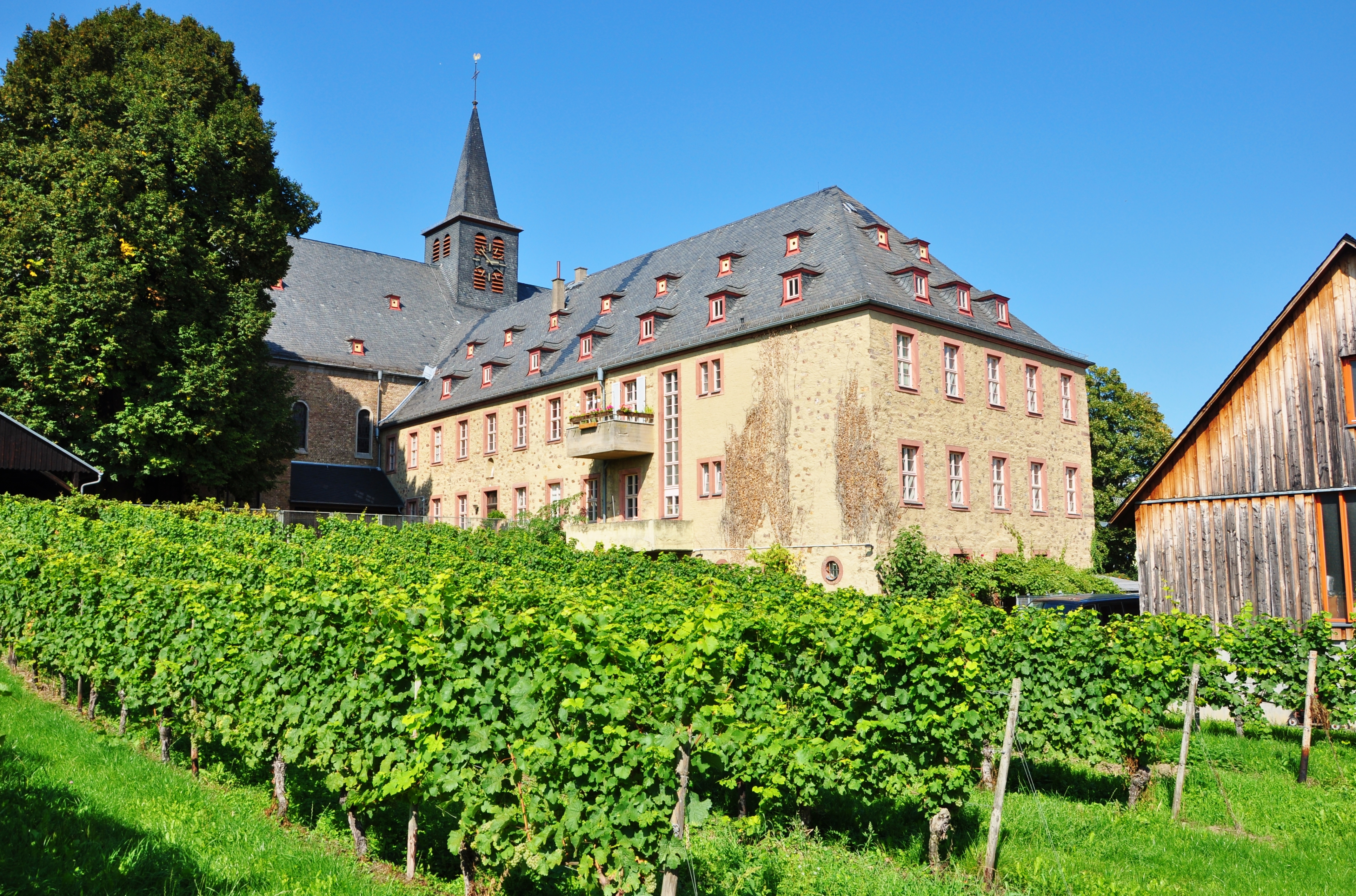 Ansicht des ehemaligen Klosters der Heiligen Hildegard von Bingen in Rüdesheim am Rhein. Im Vordergrund liegt das Bischöfliche Weingut Rüdesheim.